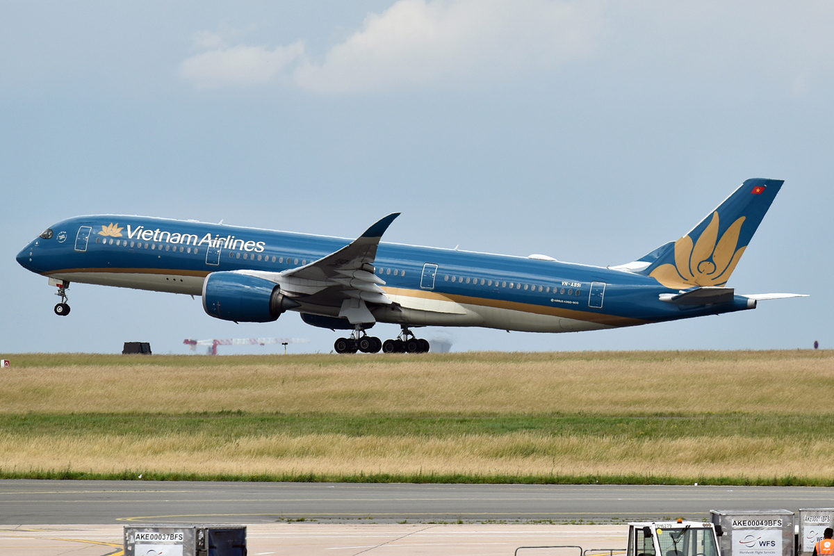 Vietnam Airlines, VN-A891, Airbus A350-941